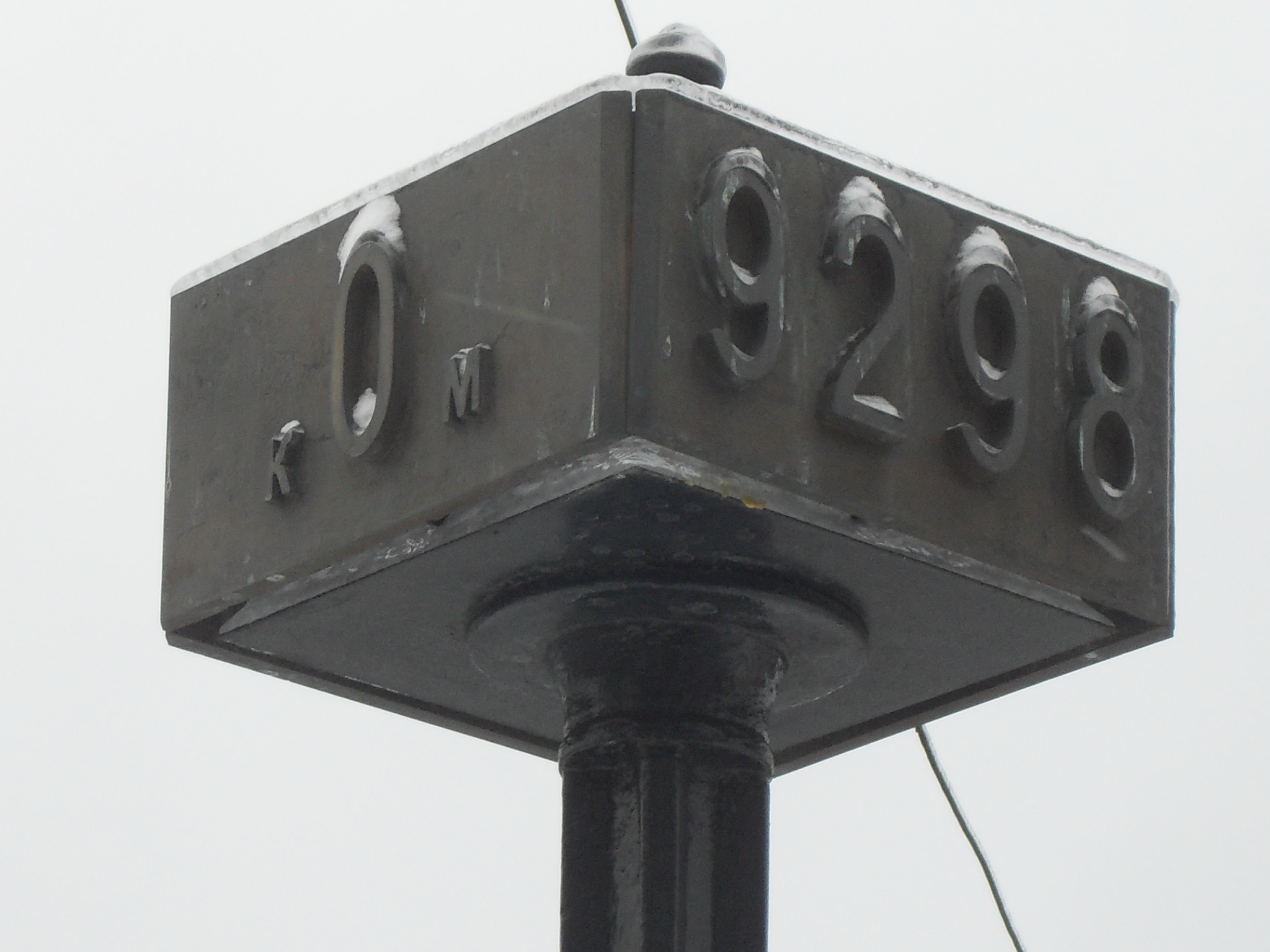 Километровый столб "Нулевой километр" на Ярославском вокзале г.Москва с указанием протяженности Транссибирской магистрали - расстояния от Москвы до Владивостока.